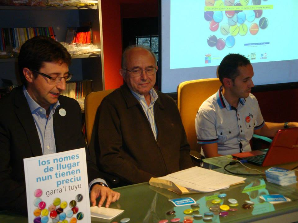 Presentación de la campaña "Los nomes de llugar nun tienen preciu"